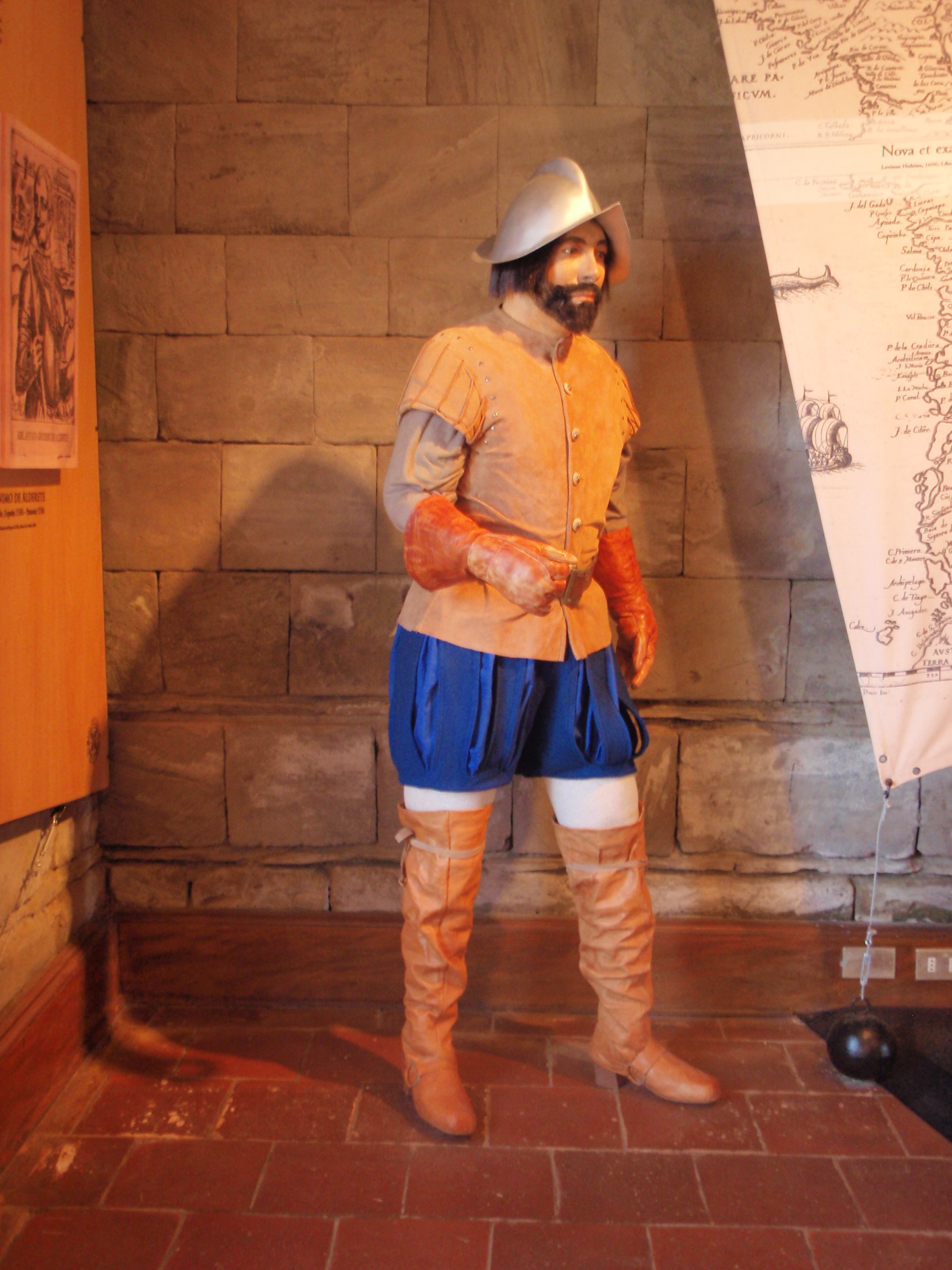 Castillo de Niebla This is a photo of a national monument in Chile: 170